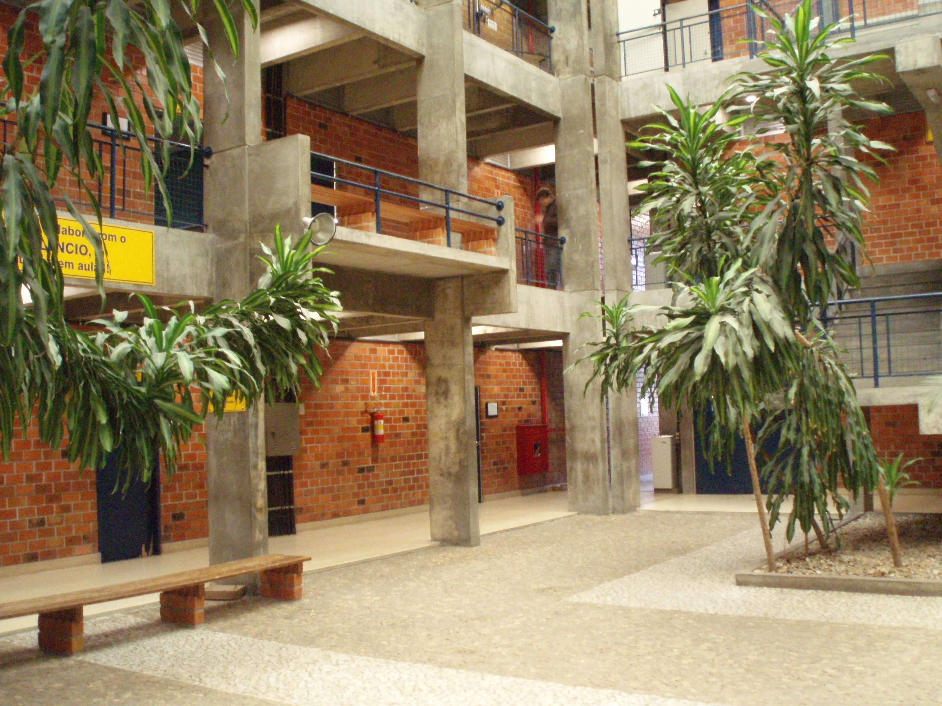 Vue de l'intérieur du bâtiment regroupant les salles de cours du CTC de l'Université fédérale de Santa Catarina, Florianópolis, Brésil.